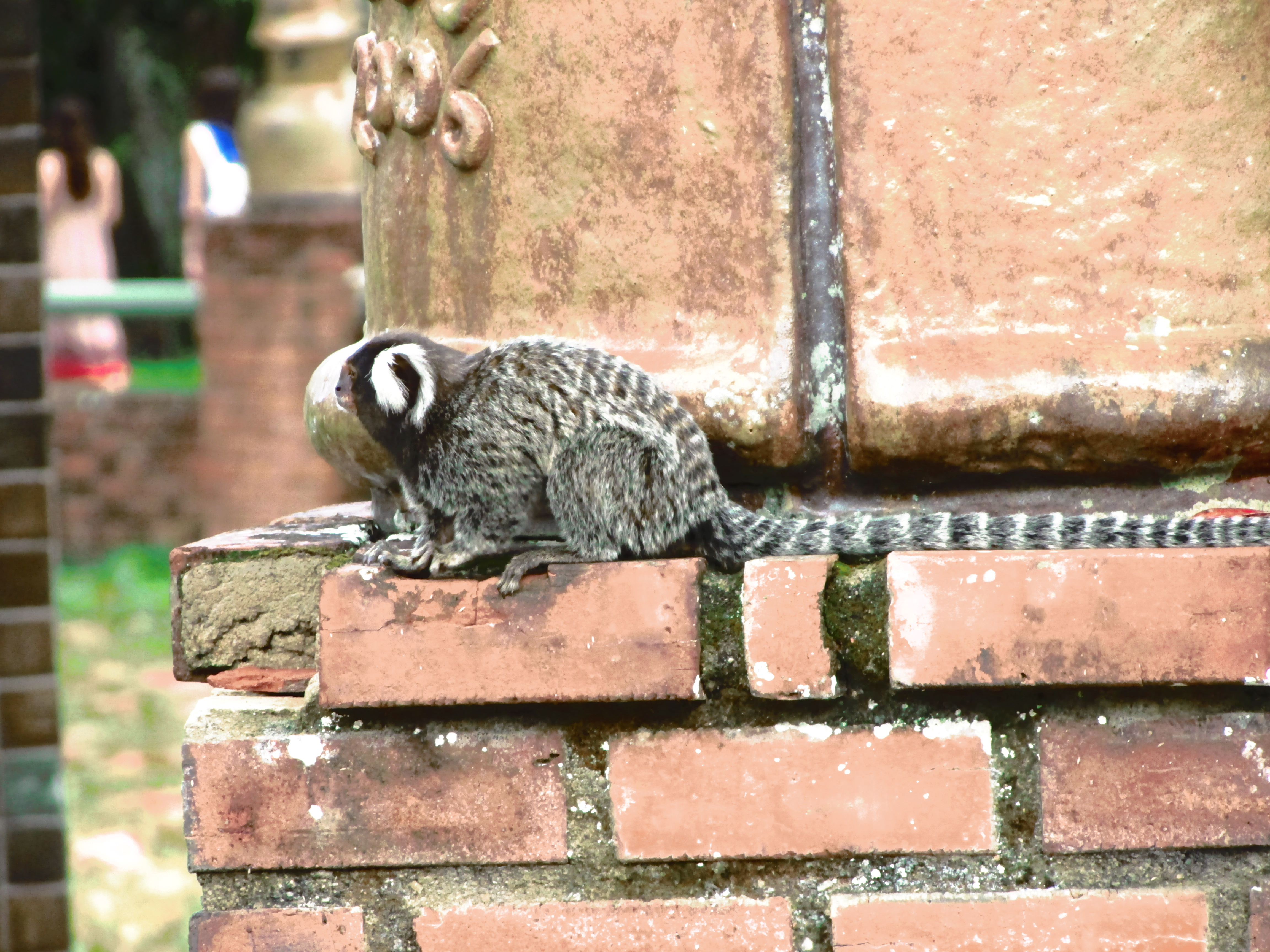 Saguin em Brennand